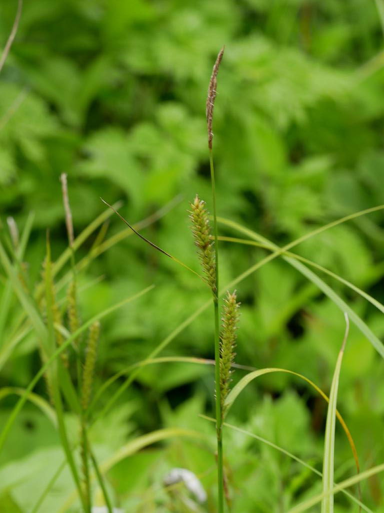 2019/06/19 新潟県：Niigata Pref. Japan